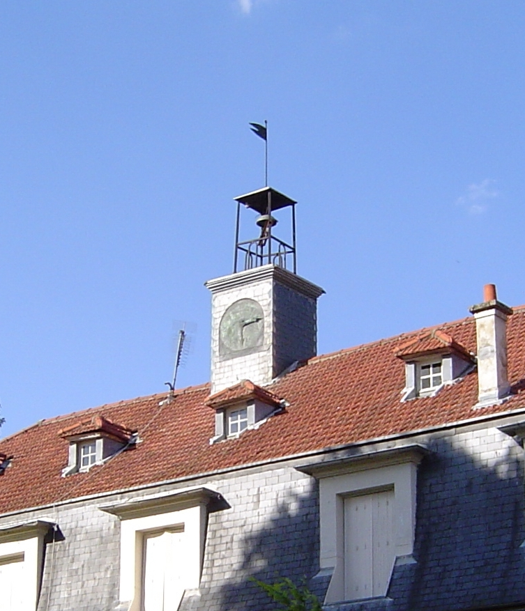 Antony